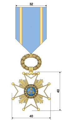 Triju Zvaigžņu ordenis